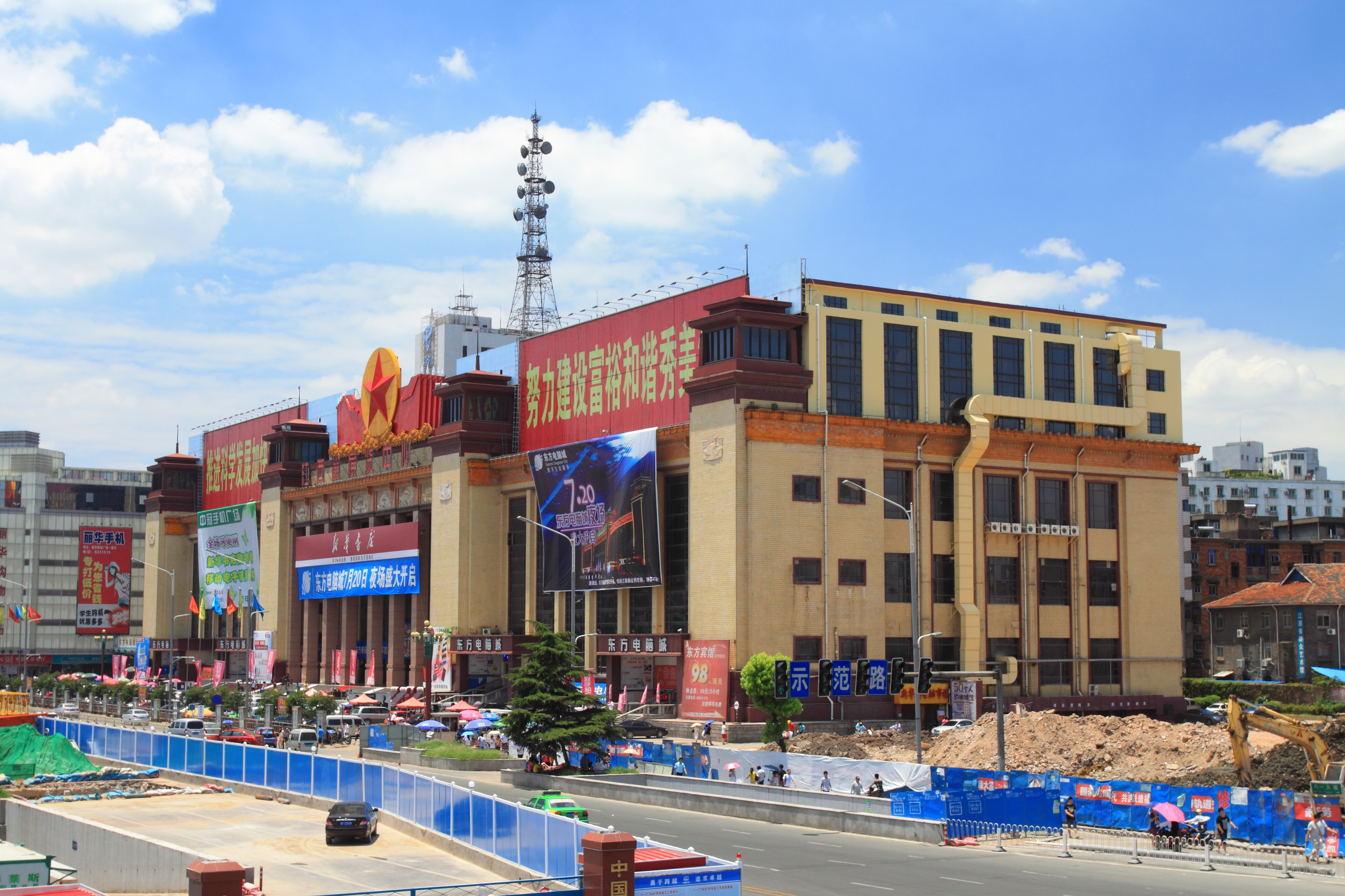 八一广场西侧的江西省展览中心（毛泽东思想胜利万岁馆），位于中国江西省南昌市。